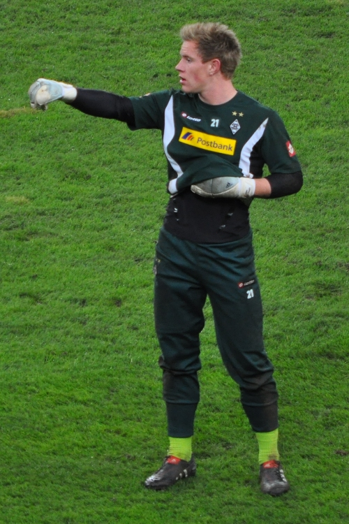 Marc André Ter Stegen vor dem Pokalspiel gegen Leverkusen